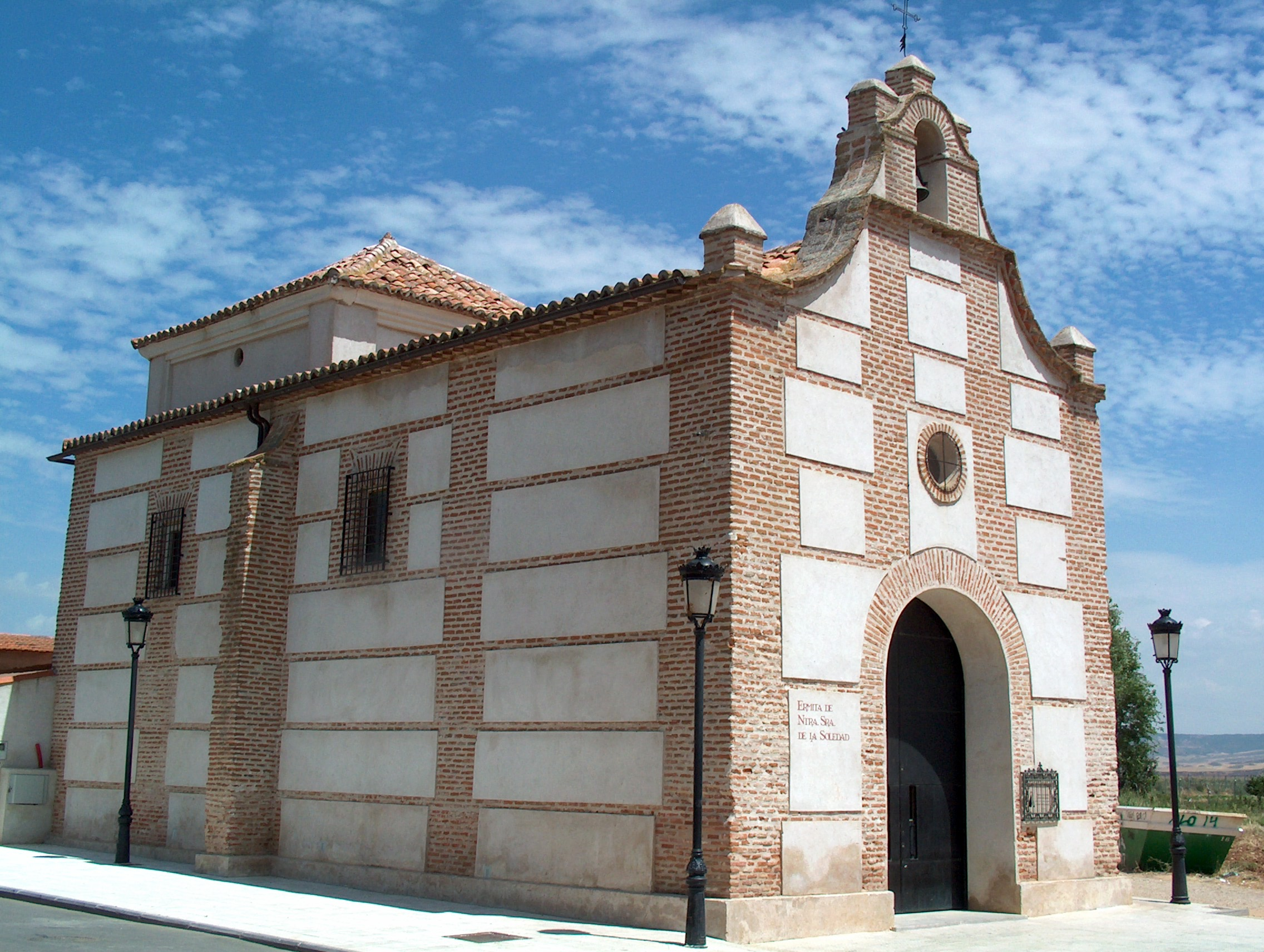 Ermita de la Soledad en Marchamalo, Guadalajara. Fotografía tomada el 03/08/2004